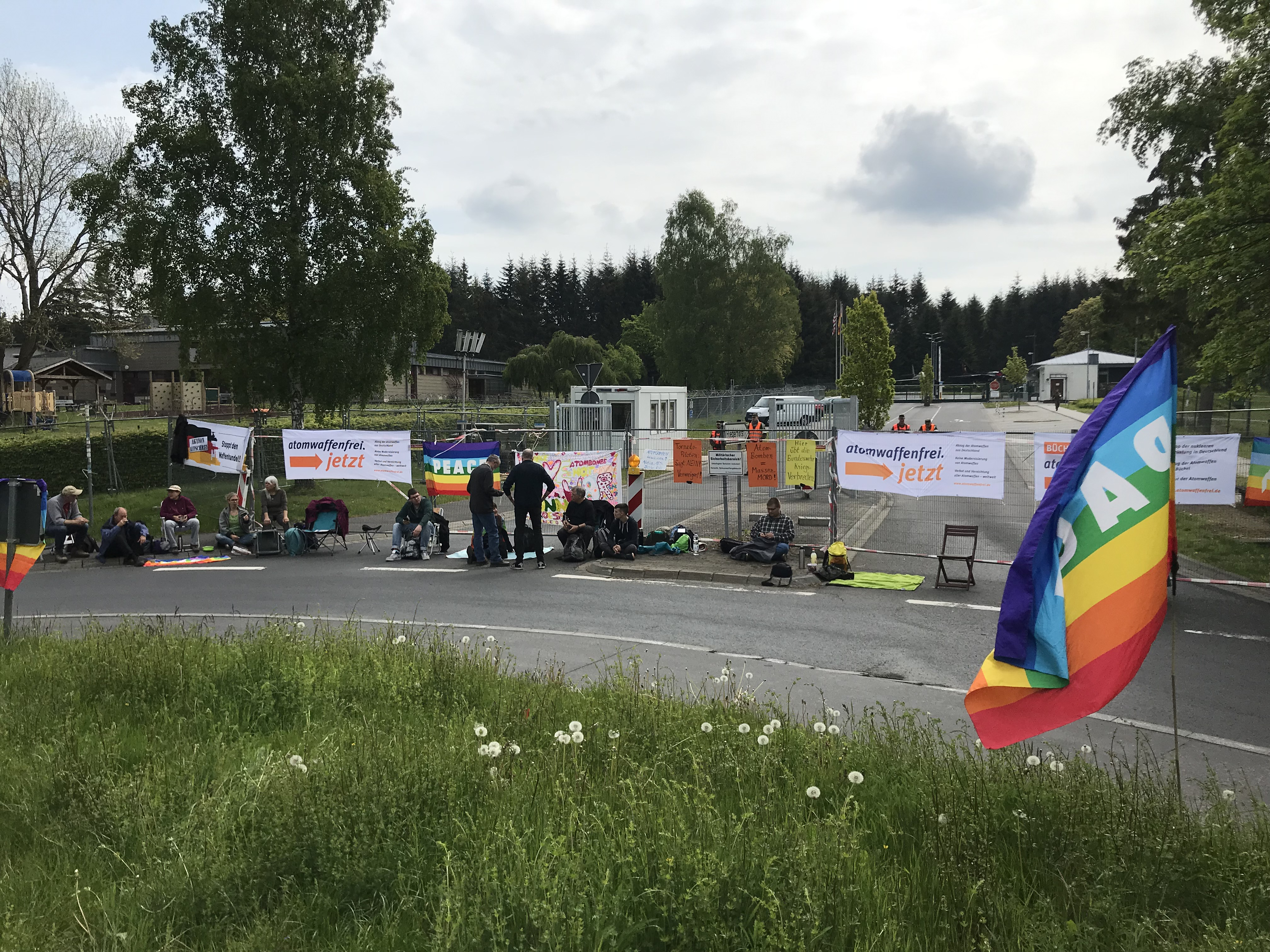 Friedliche Proteste vor dem Haupttor des Fliegerhorst Büchel für den Abzug der Atomwaffen aus Büchel im Jahr 2018